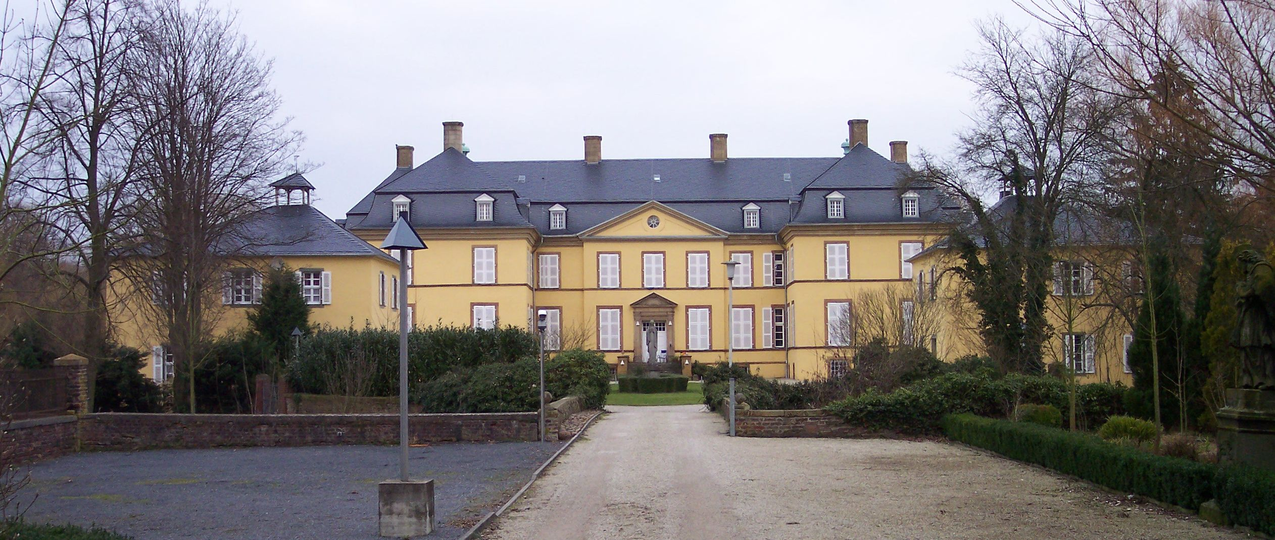 Wadersloh, Schloss Crassenstein